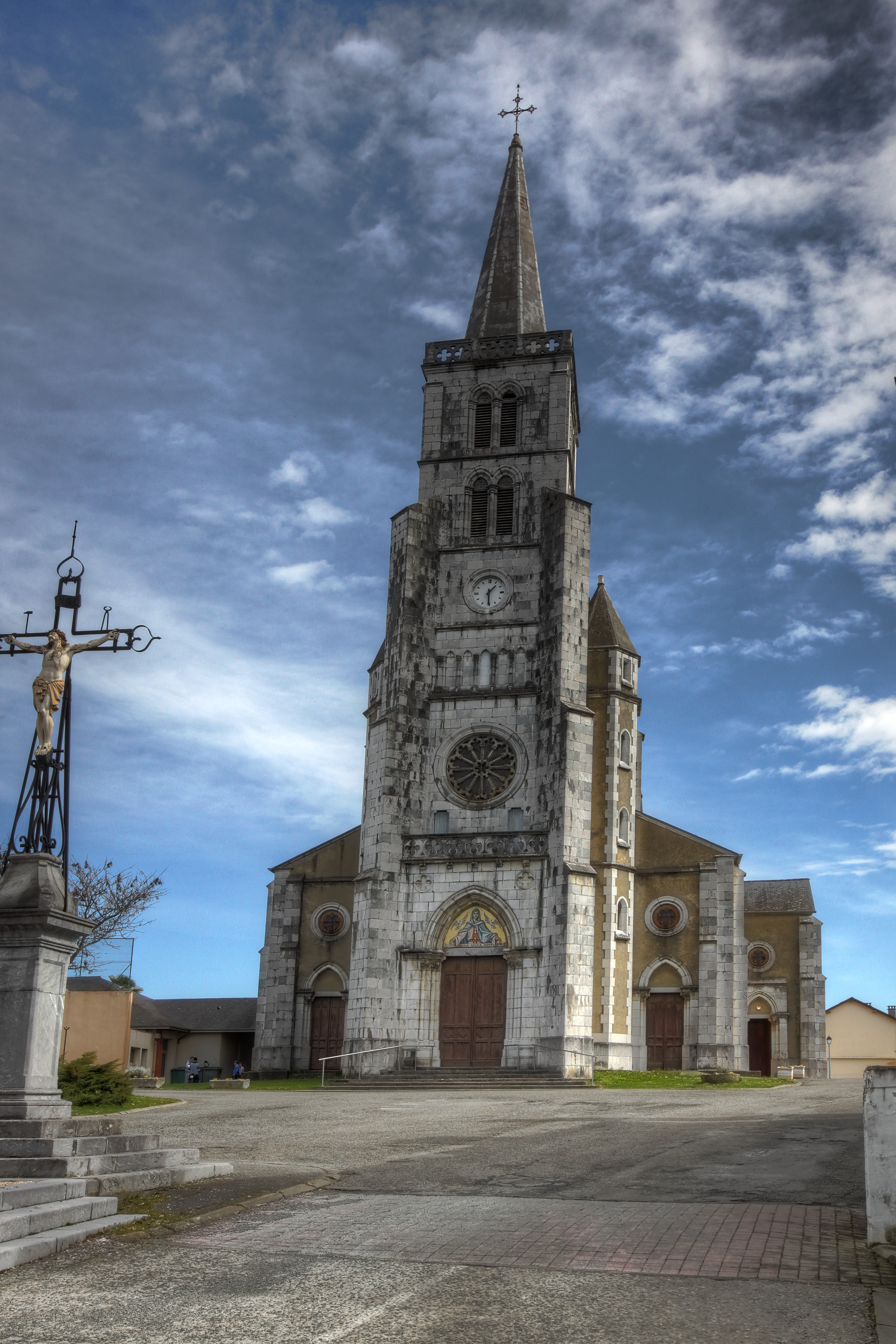 Église de l`Assomption-de-Notre-Dame à Bénéjacq dans le departement des Pyrénées-Atlantiques